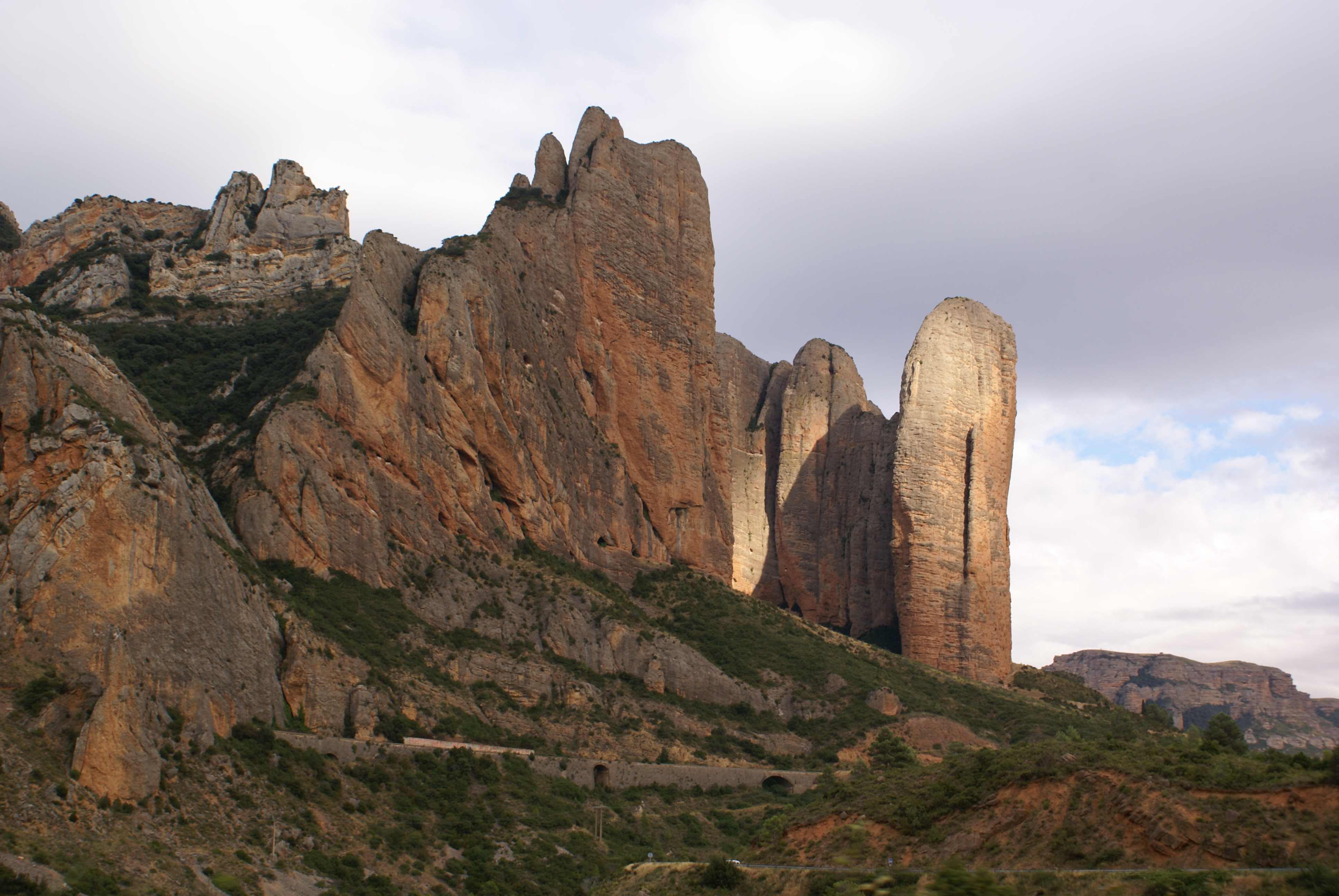 Mallos de Riglos (Huesca)